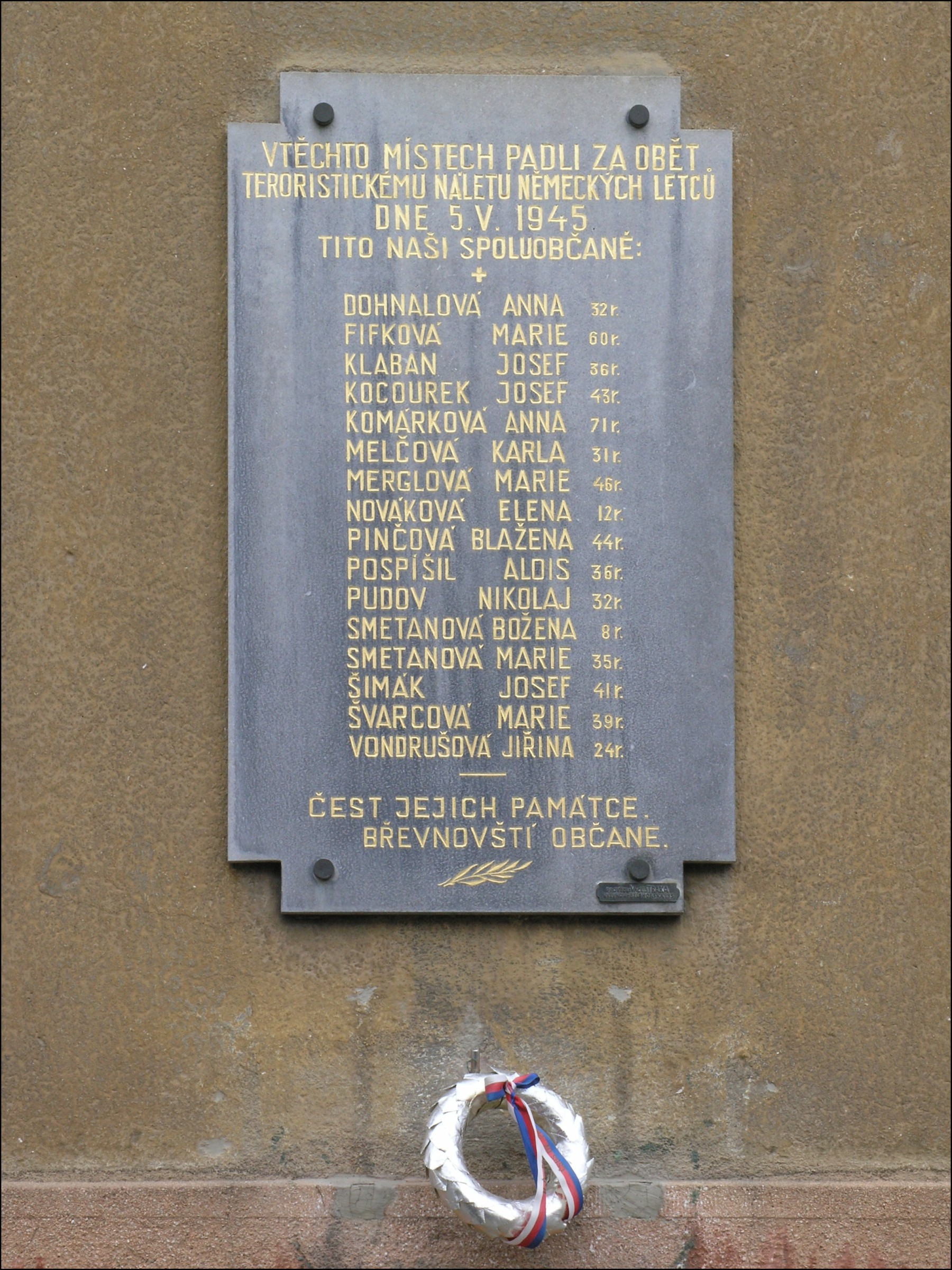 Praha, Břevnov - pamětní cedule obětem náletu z 5. května 1945 ve Šlikově ulici